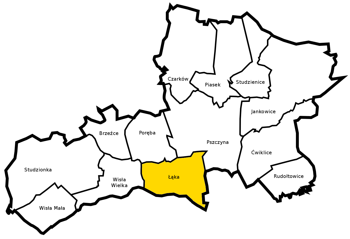 Gmina Pszczyna - sołectwo Łąka